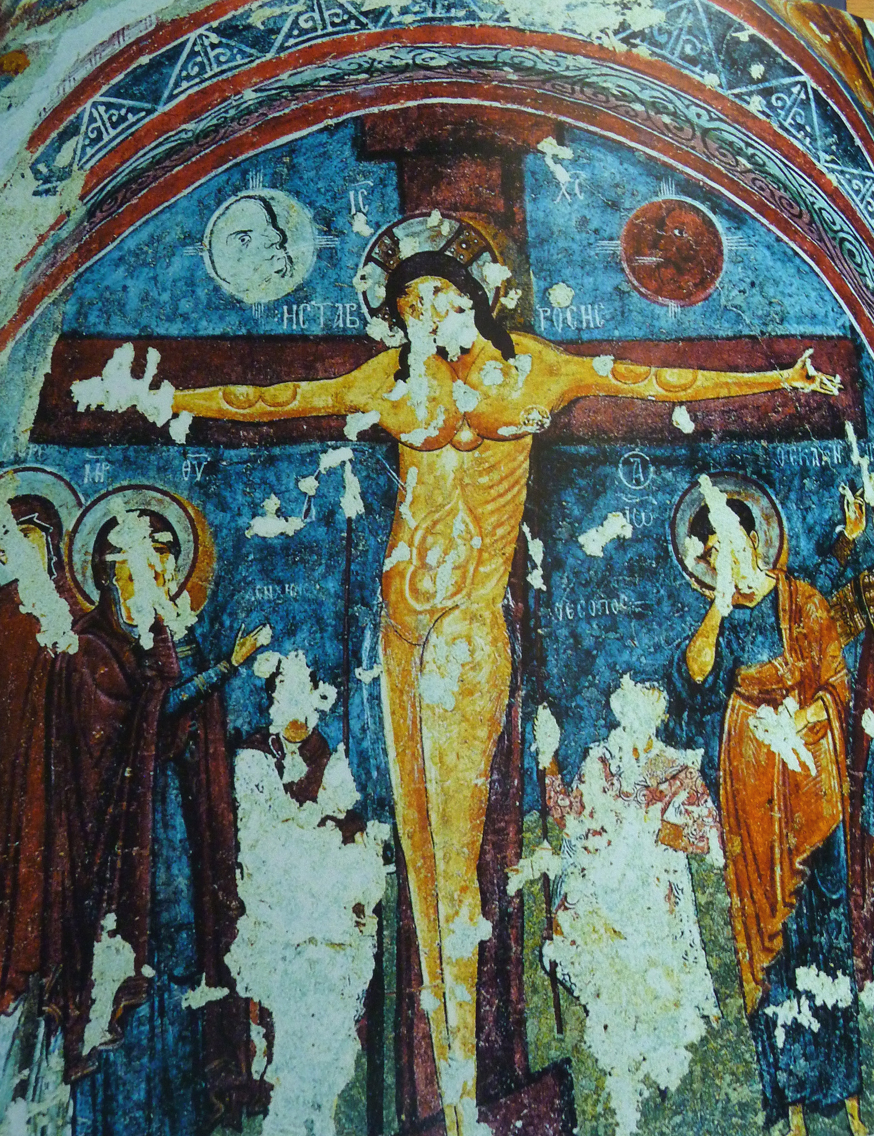 Kappadókia/Göreme Nemzeti Park: Carikli-sziklatemplom freskója